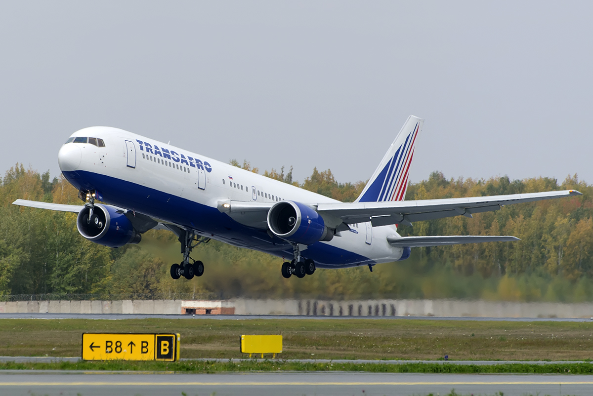 с 04.04.2013г. аэродром Тюмень (Рощино) допущен к эксплуатации ВС типа Boeing 767-300